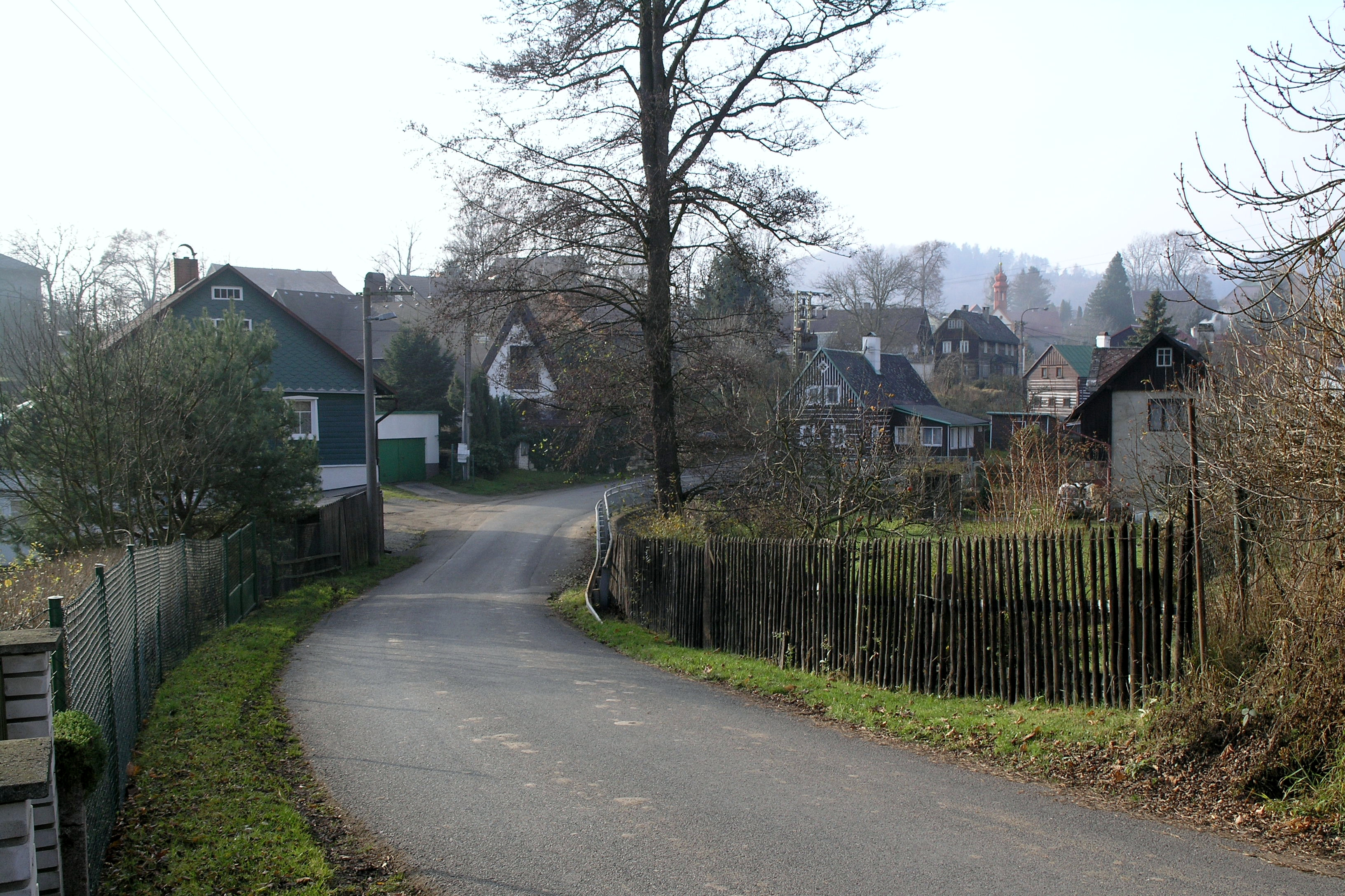 Chotovice v okrese Česká Lípa, ČR